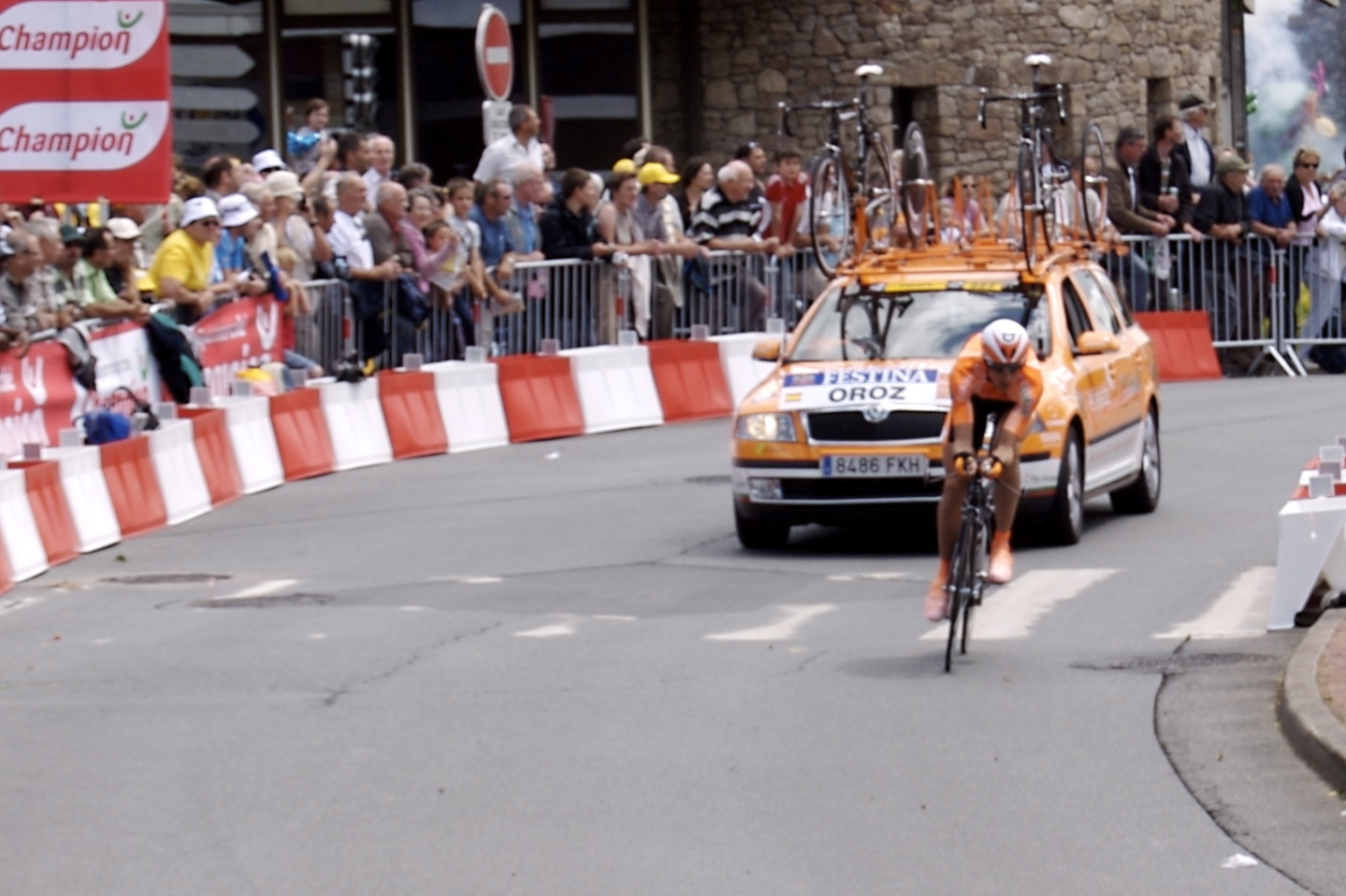 Juan José Oroz. Première curve du contre la montre lors du Tour de France 2008, face à la Médiathèque Elie Chamard, sur Cholet